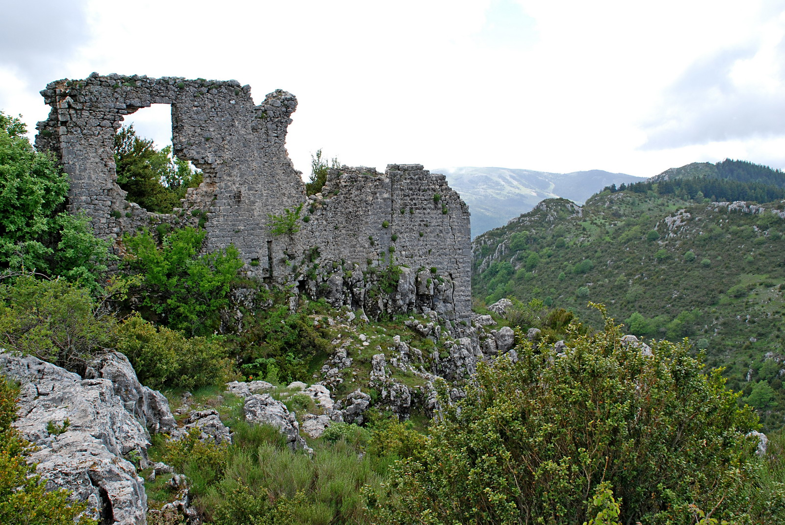 Oppidum de Castellaras